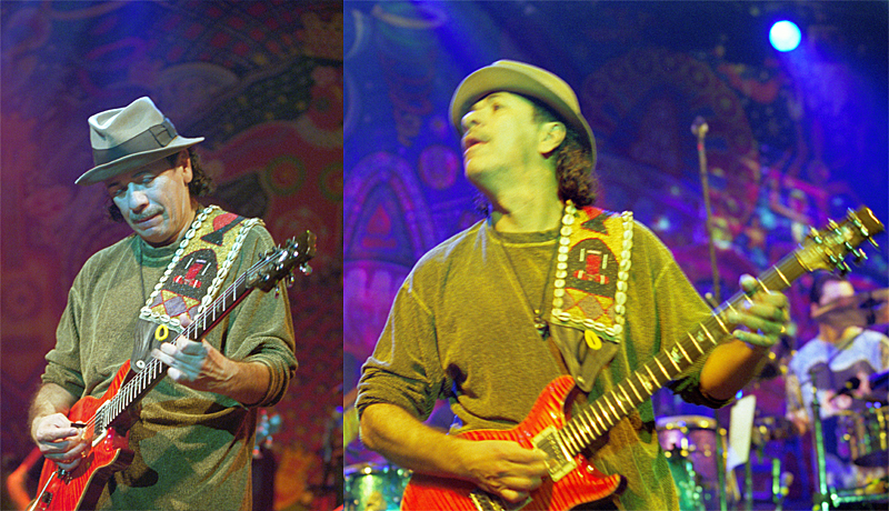 Carlos Santana am 21. Januar 2000, in München, Muffat-Halle